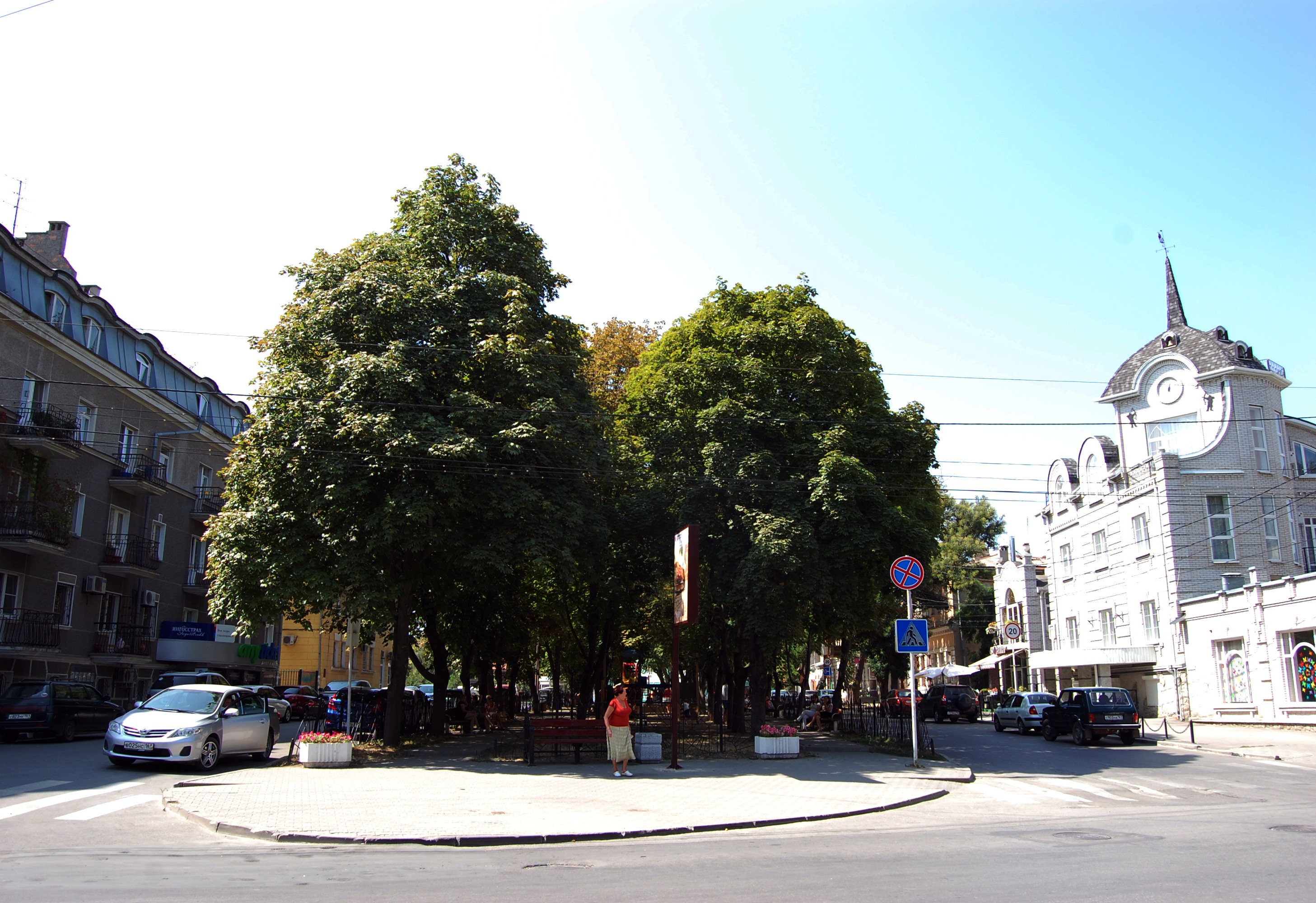 Таганрог, Украинский переулок, Центральная детская площадка